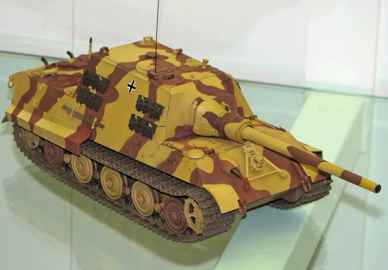 Dieses Bild zeigt ein Modell des Panzerjägers "Jagdtiger" mit Henschel-Laufwerk.